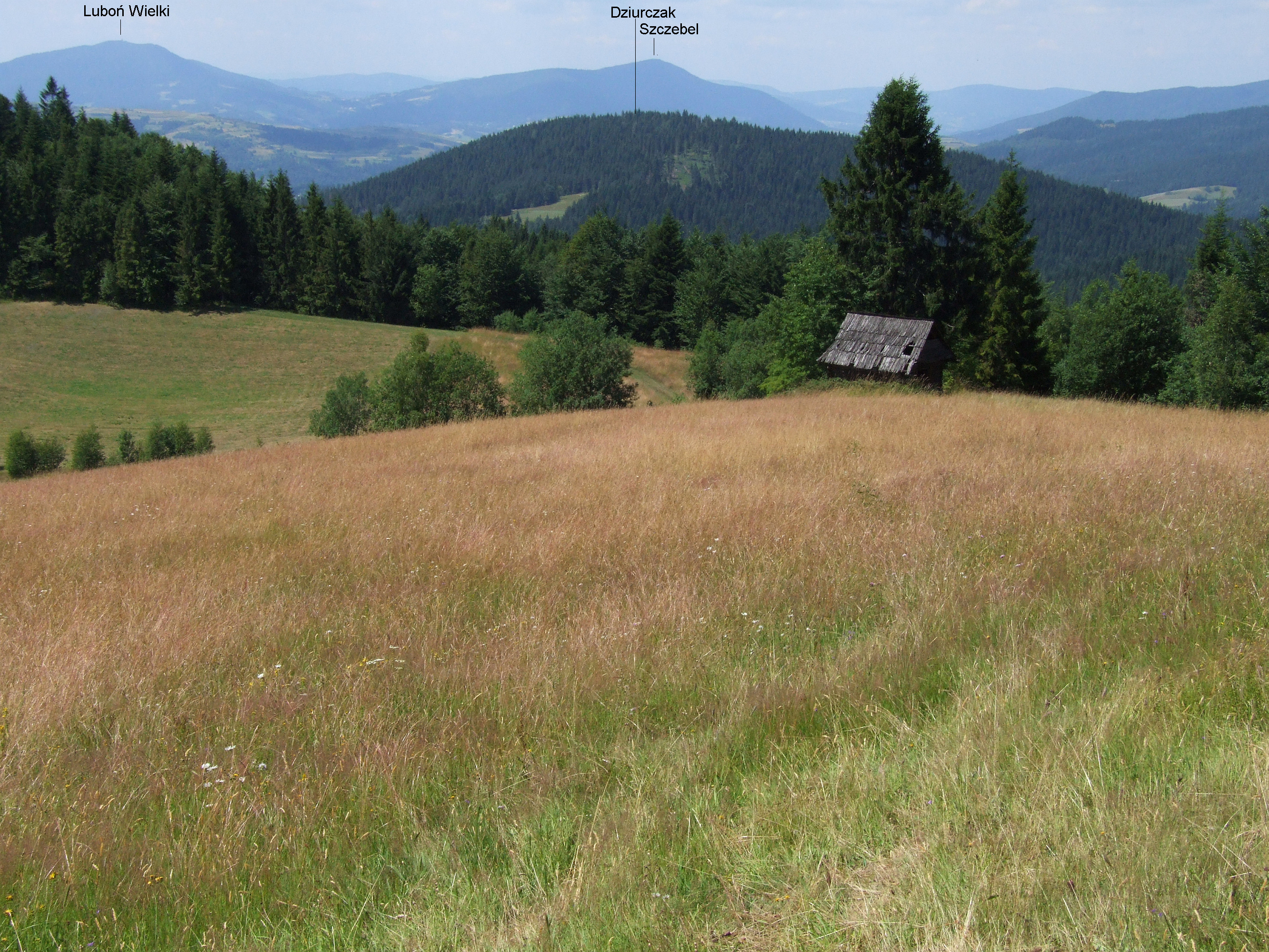 Polana Stasiówka w Beskidzie Wyspowym